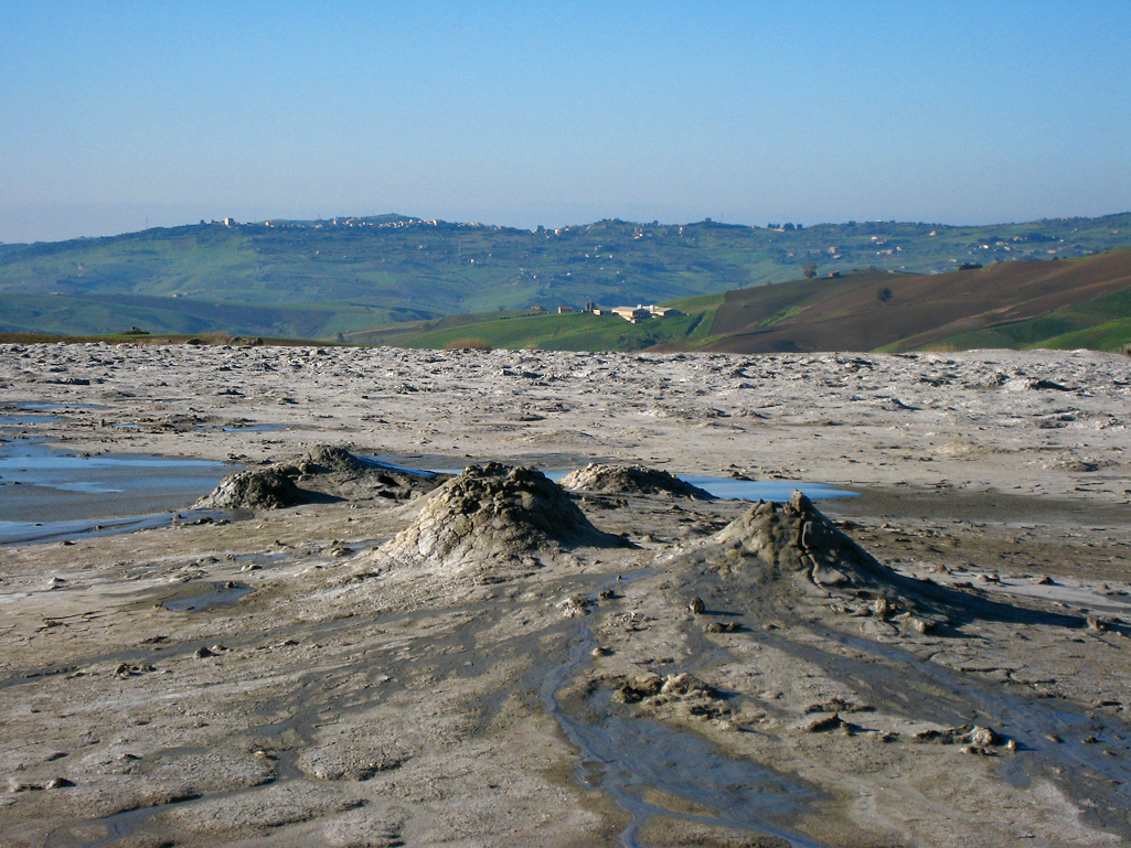 Vulcanelli di Macalube near Aragona in Sicily